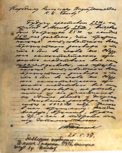 Признательные показания Тухачевского, о возглавлении военно-троцкистского заговора, на имя Николая Ежова